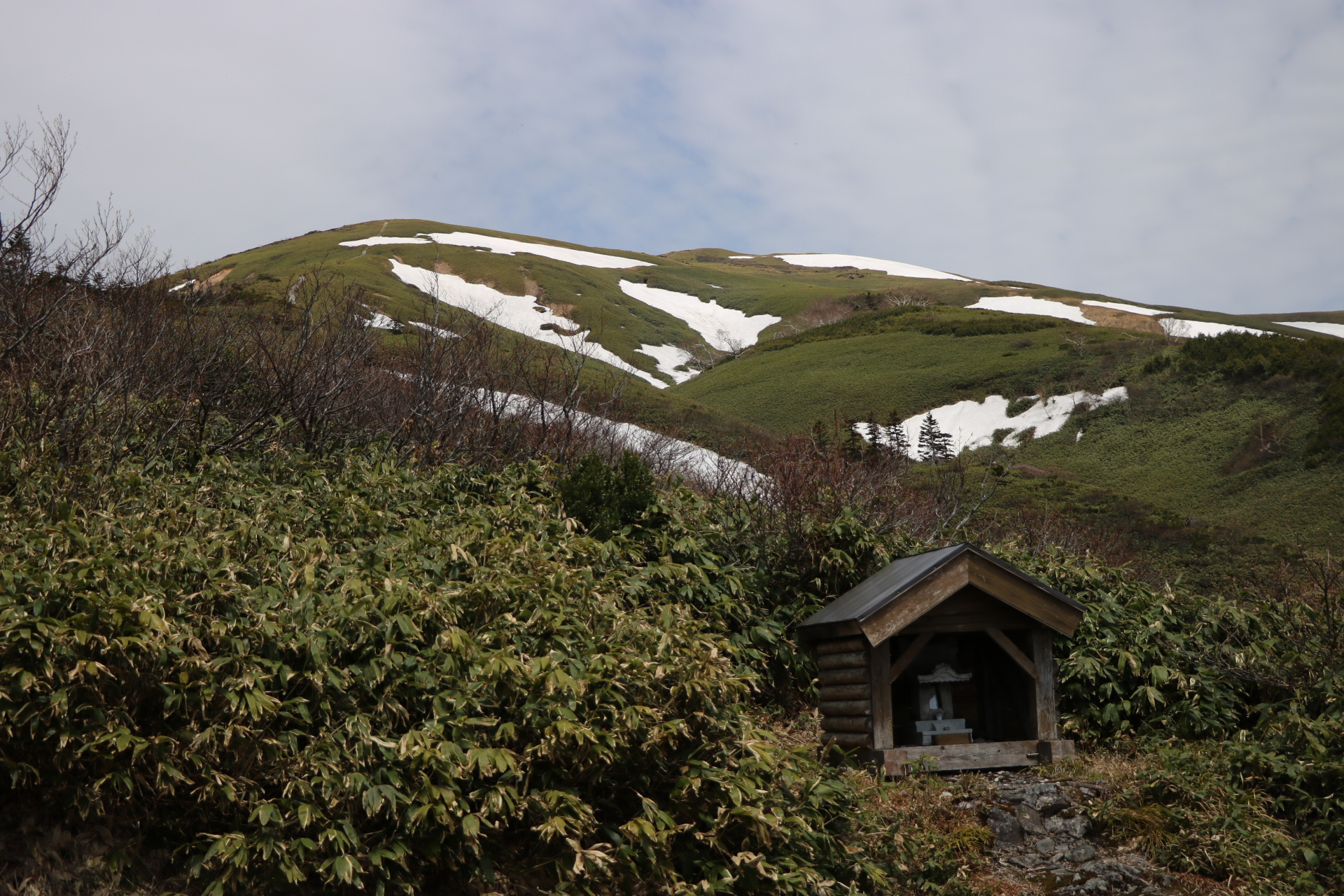 平標山の家から平標山を望む